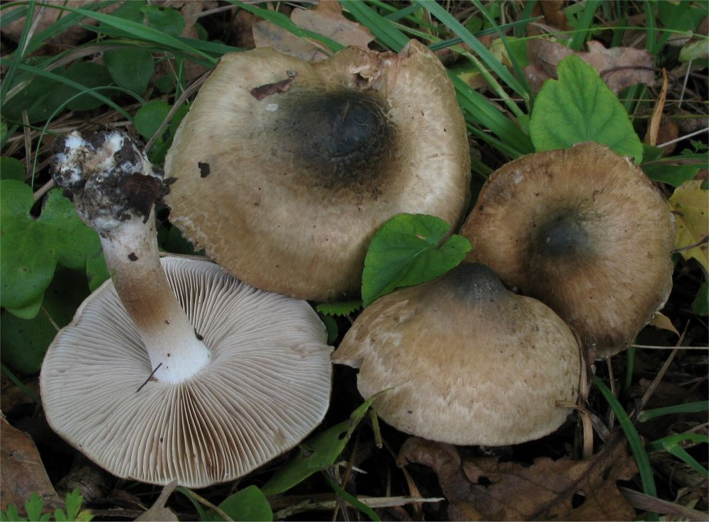 Inocybe corydalina Quél.